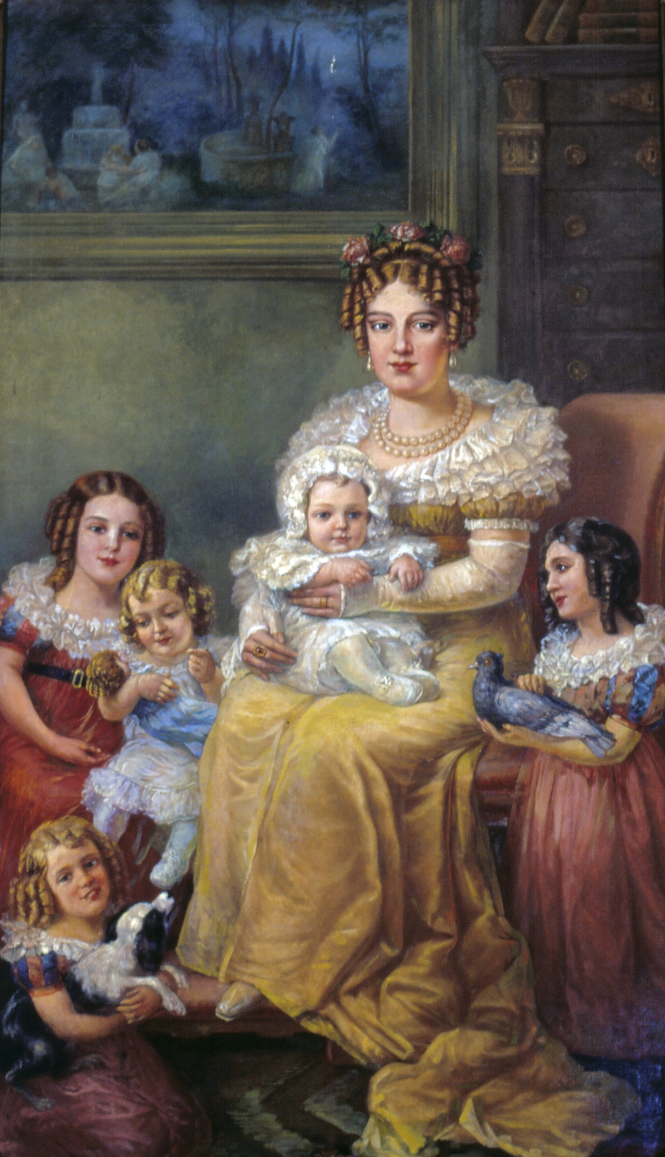 Obra que integra o acervo do Museu Paulista da USP. Coleção Fundo Museu Paulista - FMP